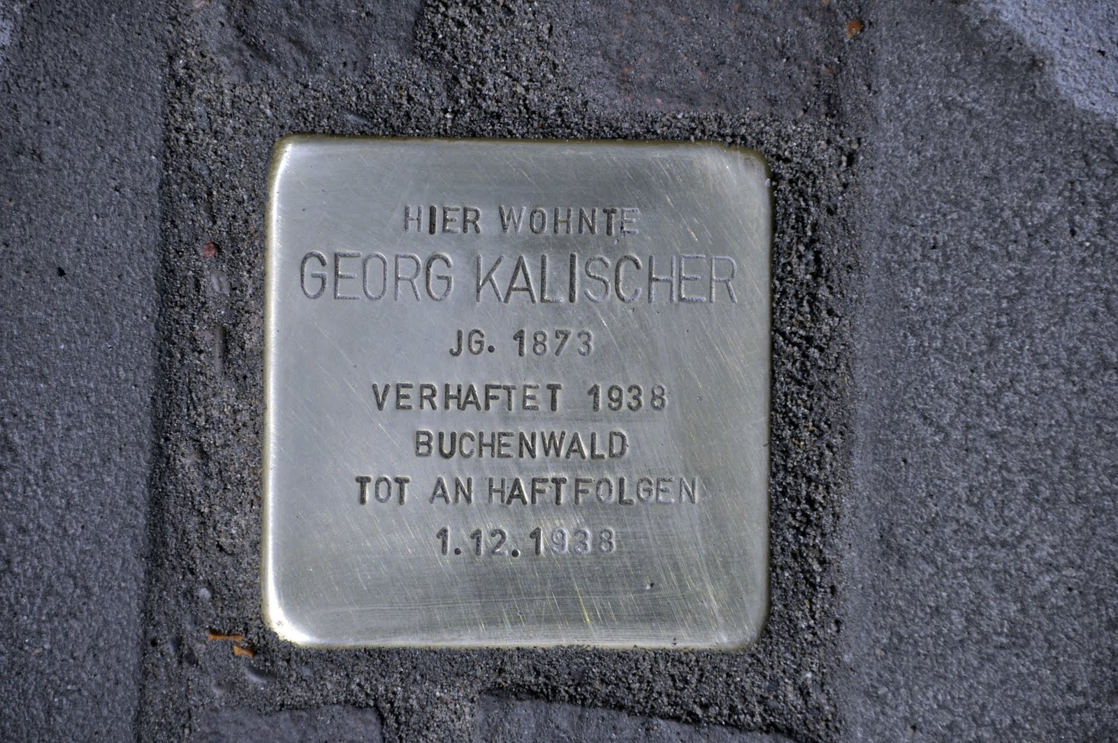 Stolpersteine Böcklingstraße 14 Georg Kalischer